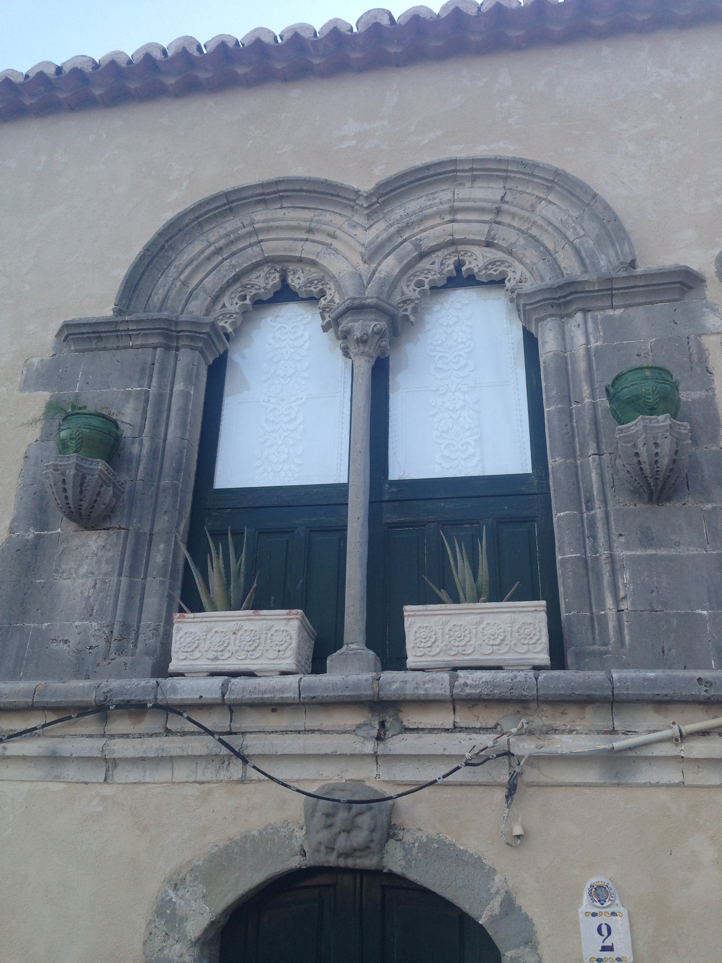 bifora quattrocentesca